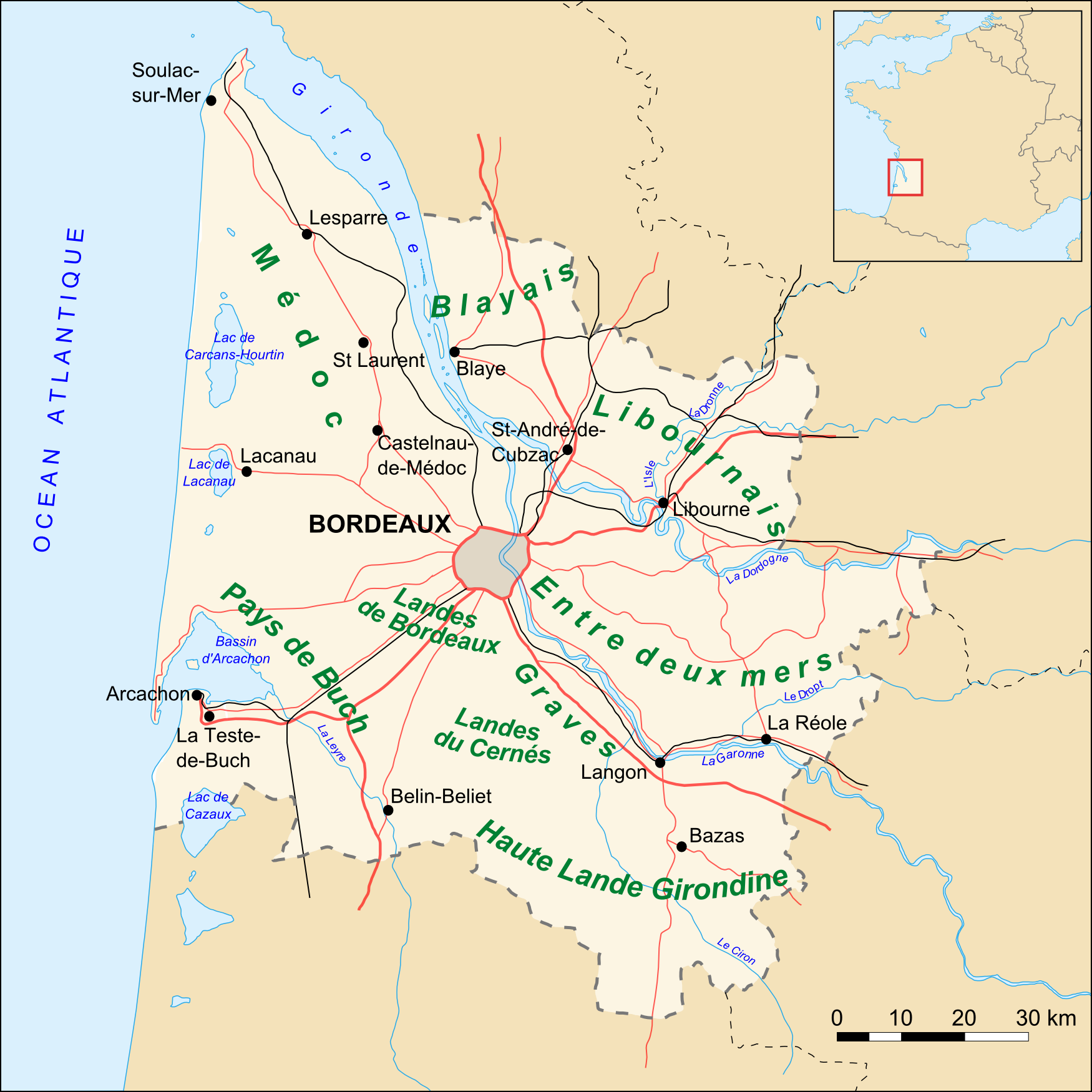 Carte du département de la Gironde: principales villes, réseau routier et les "territoires" et "pays" Based upon Image:Gironde_map_blank.svg created by Sting